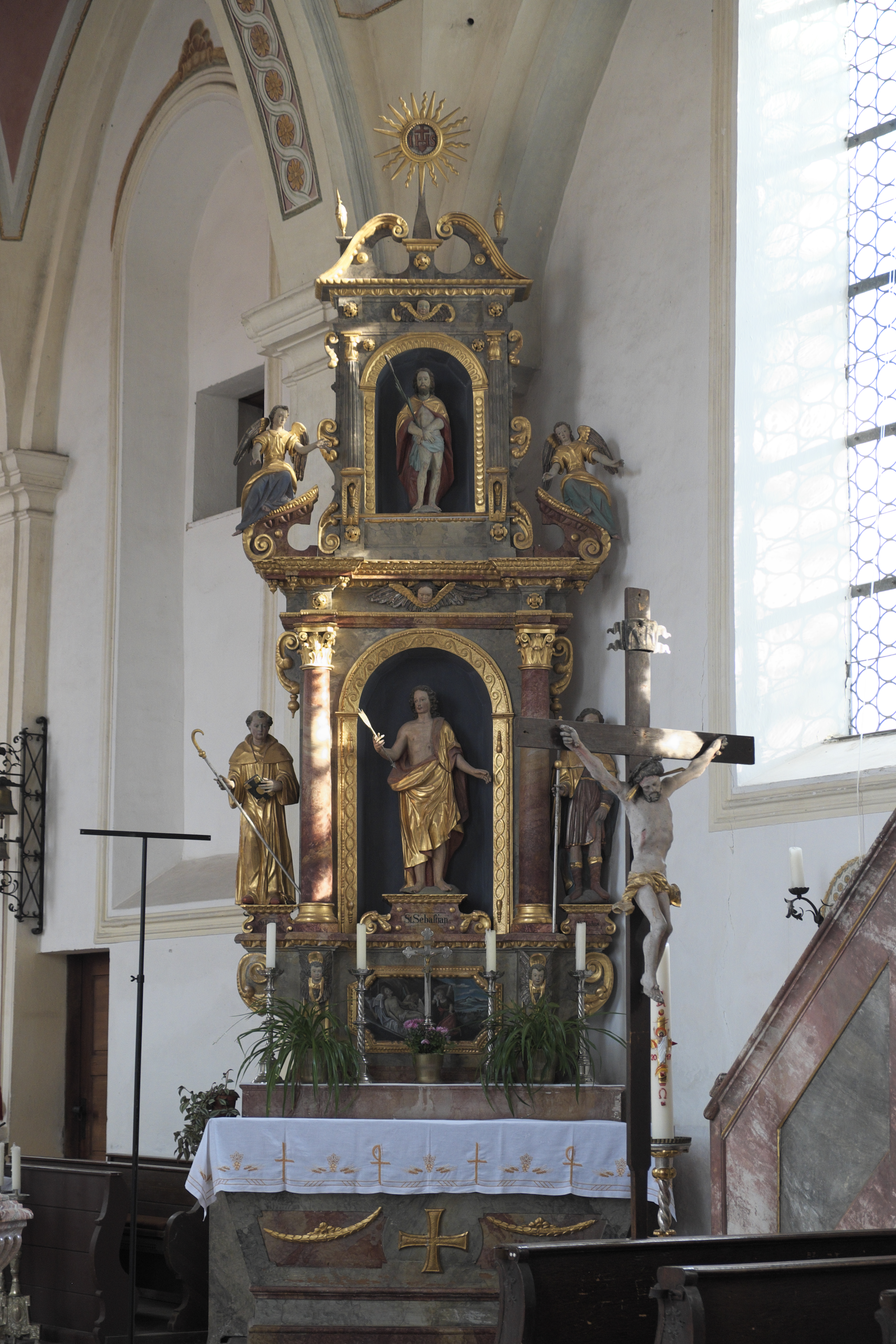 Katholische Filialkirche Mariä Himmelfahrt in Lampferding (Tuntenhausen) im Landkreis Rosenheim (Bayern/Deutschland), Seitenaltar